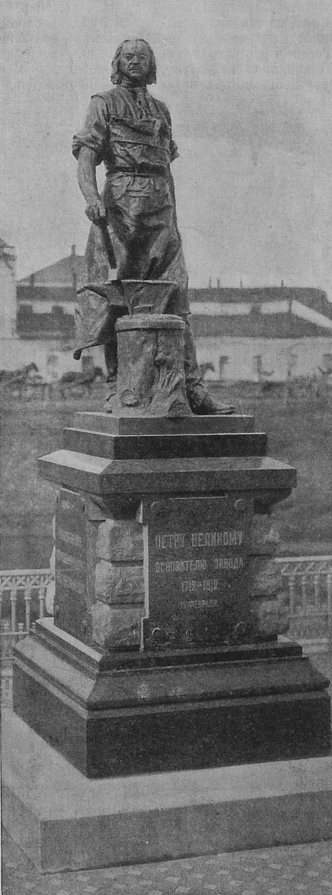 Памятник Петру Великому, основателю Тульского оружейного завода, сооружённый ко дню 200-летия завода (28 февраля 1912 года) на средства, собранные среди рабочих, мастеров и администрации завода